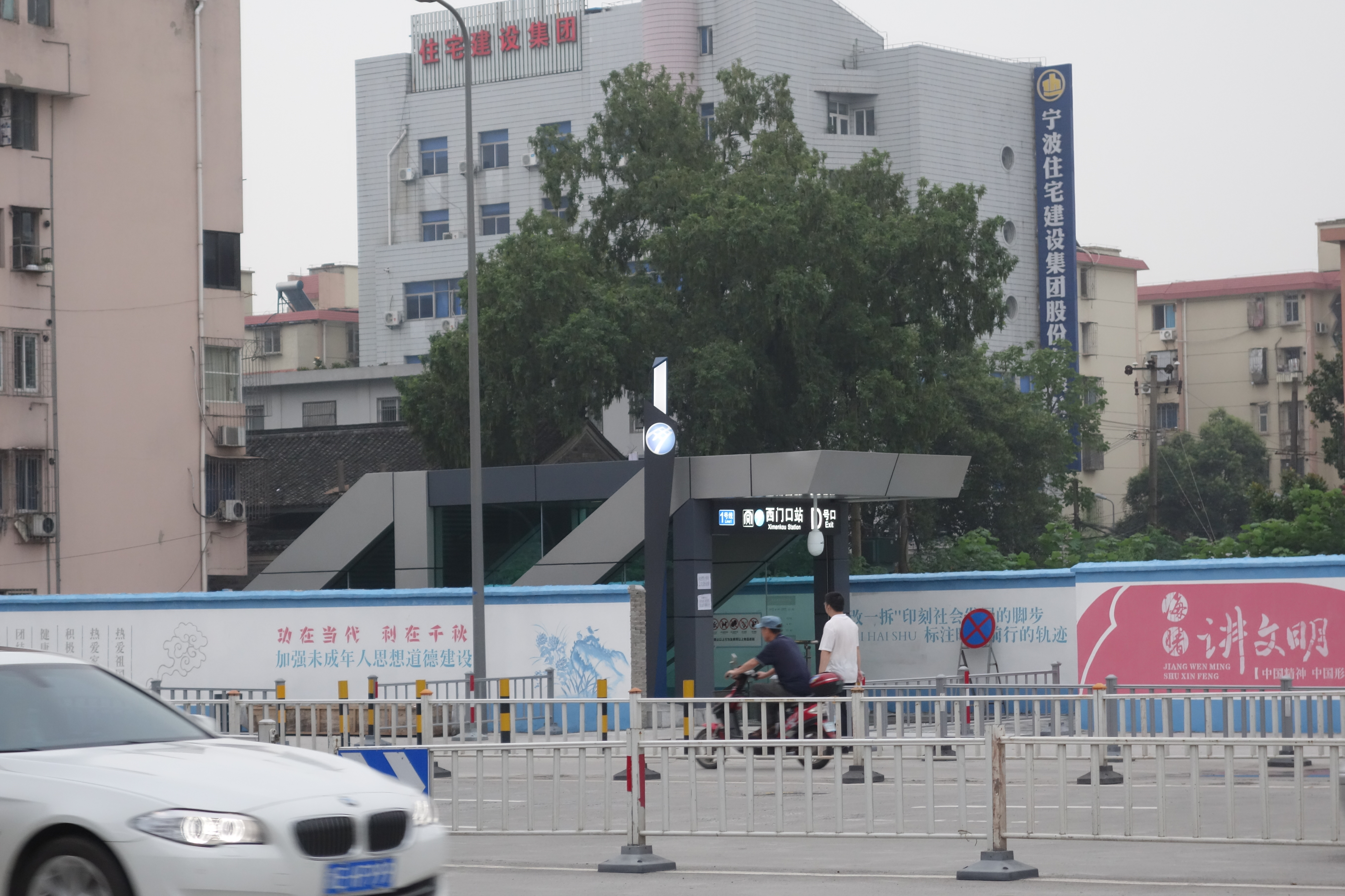 西门口站D出口